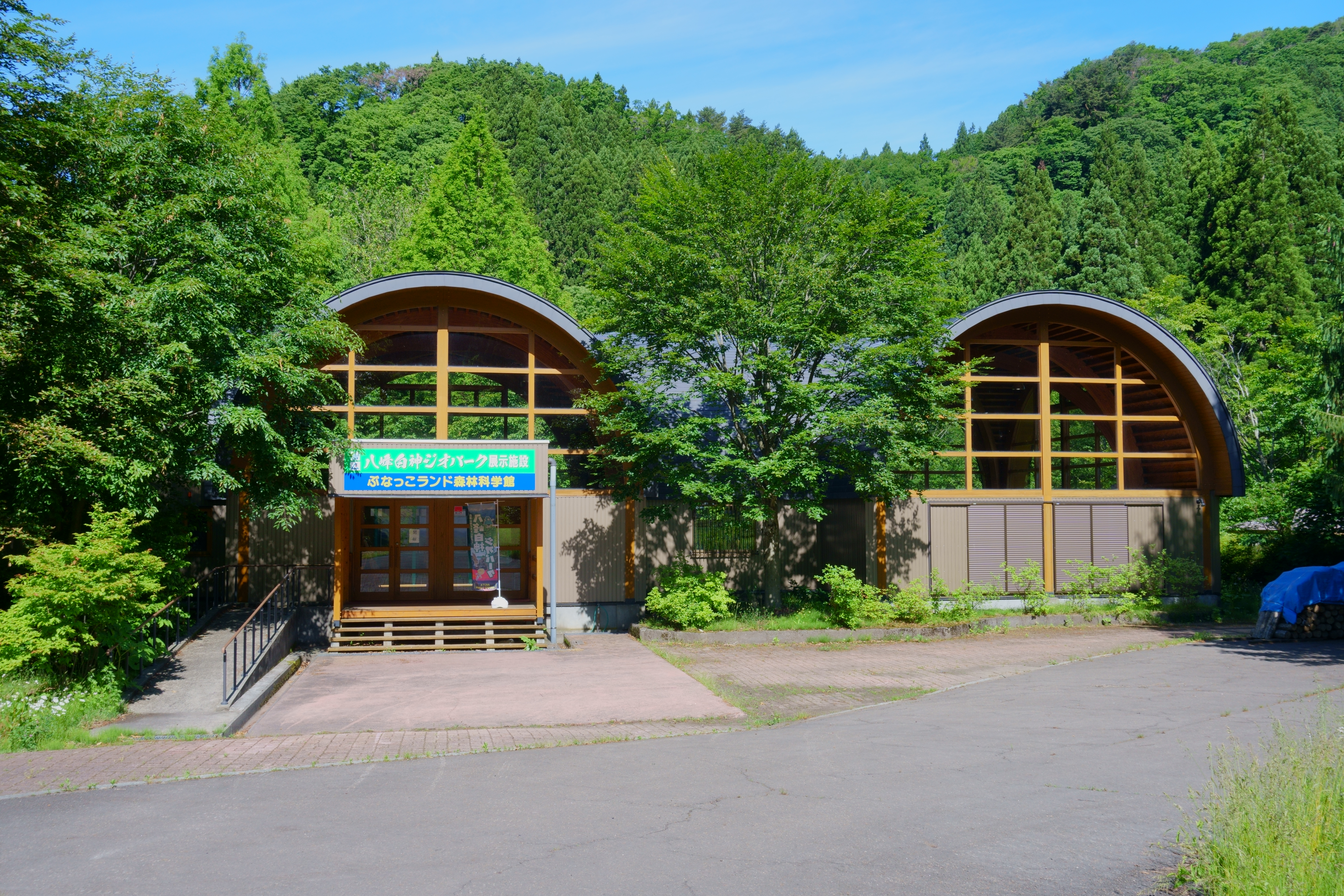 八森ぶなっこランド（秋田県山本郡八峰町）。八峰白神ジオパークの展示施設でもあるこの建物は、二ッ森岳登山口および真瀬渓谷の近くにある。